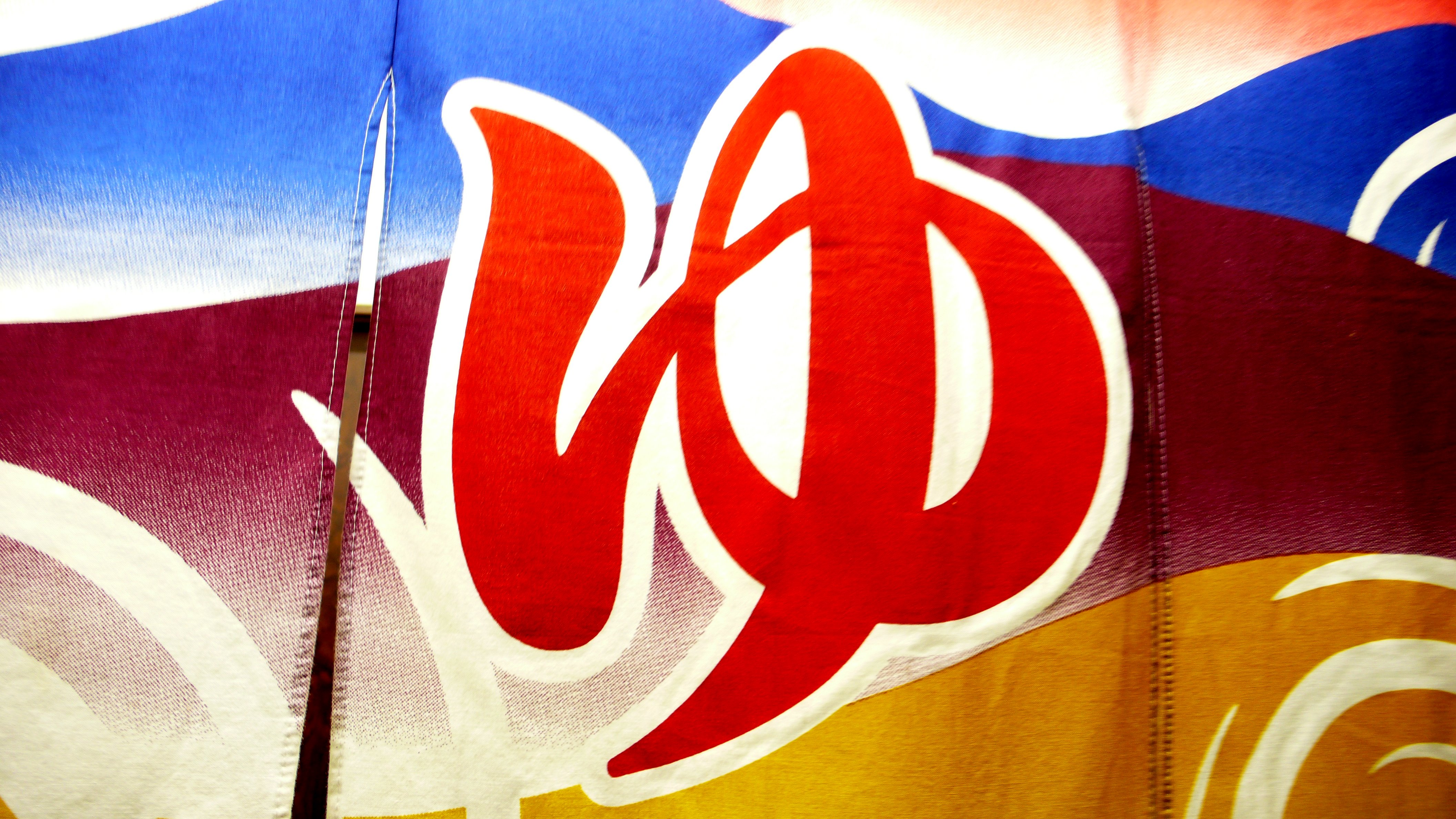 銭湯の暖簾（東京都江東区富岡、森下駅付近）